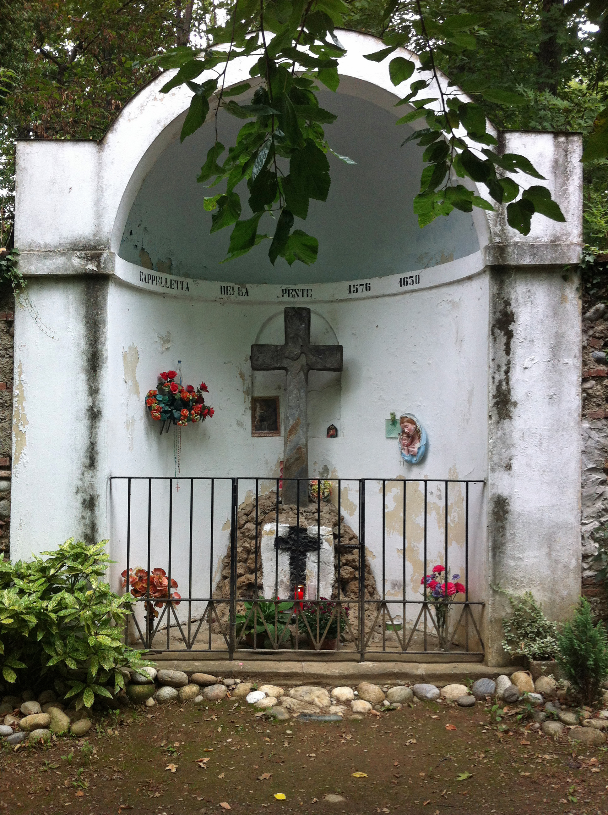 La cappella della peste 1576-1630, situata nel parco della villa Borromeo D'Adda, Arcore